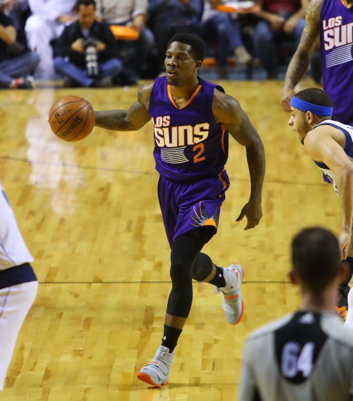 Partido NBA